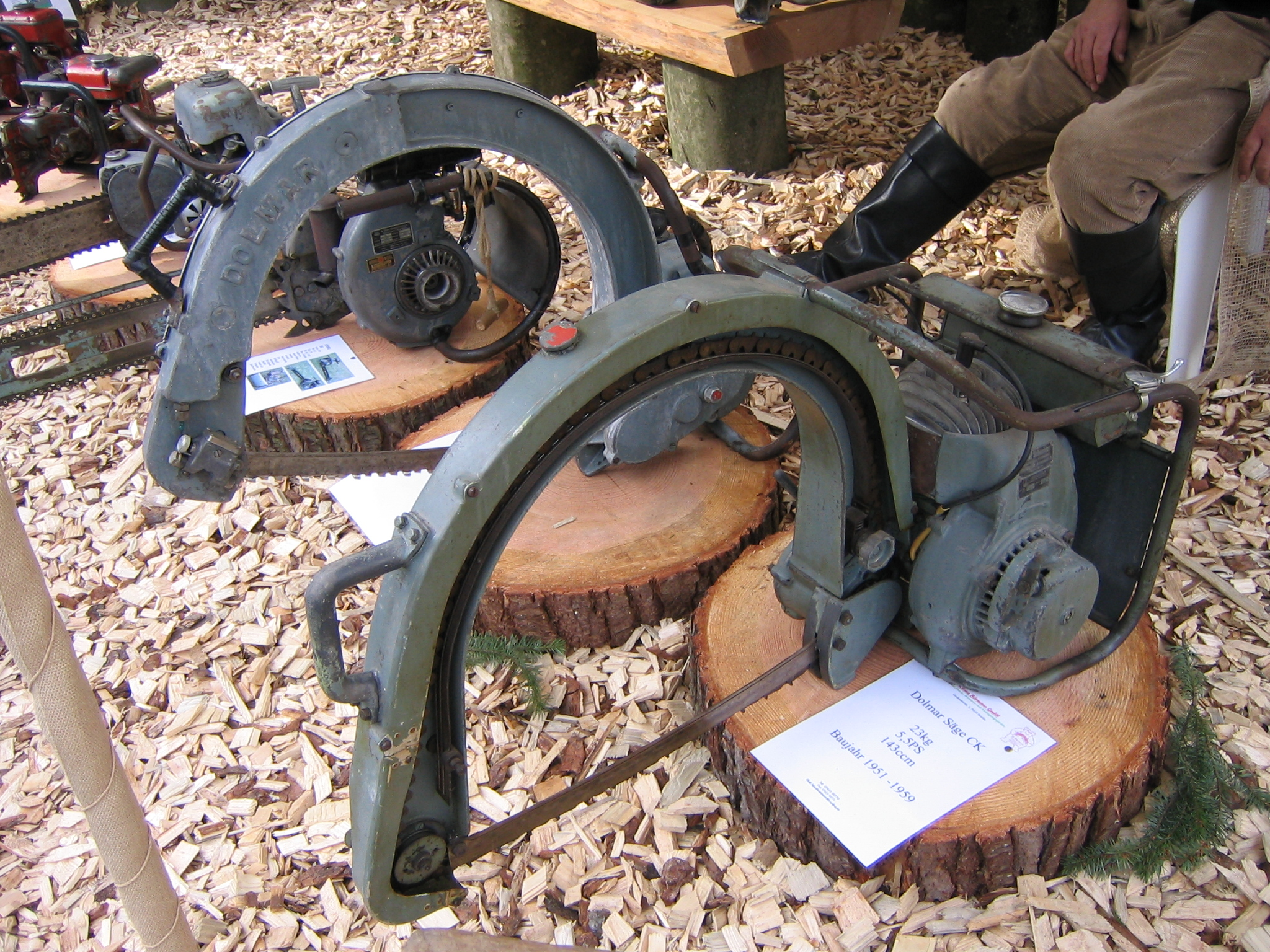 Zwei Holzsägen von Dolmar. Im Vordergrund Model CK 23 kg 5,5 PS 143 ccm Baujahr 1951-59